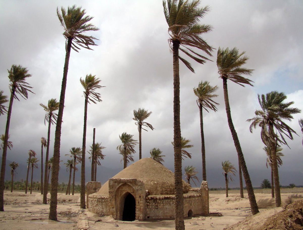 برکه مَمَدایی در گراش، ۱۳۸۸